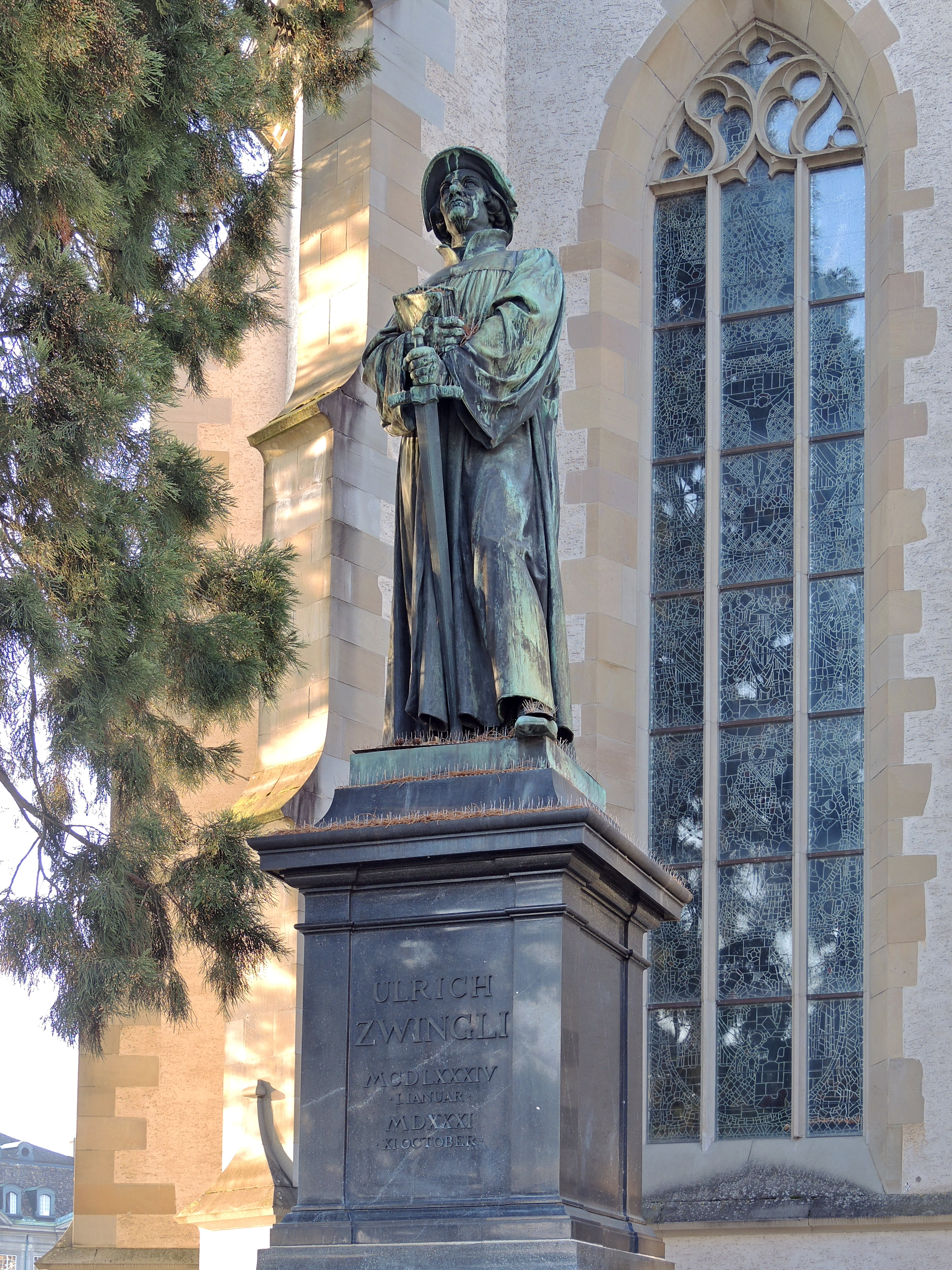 Ulrich Zwingli memorial, Wasserkirche in Zürich